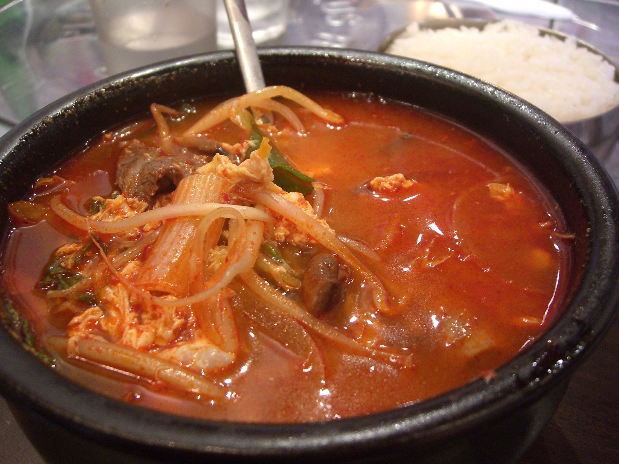 Yukgaejang, Korean beef soup